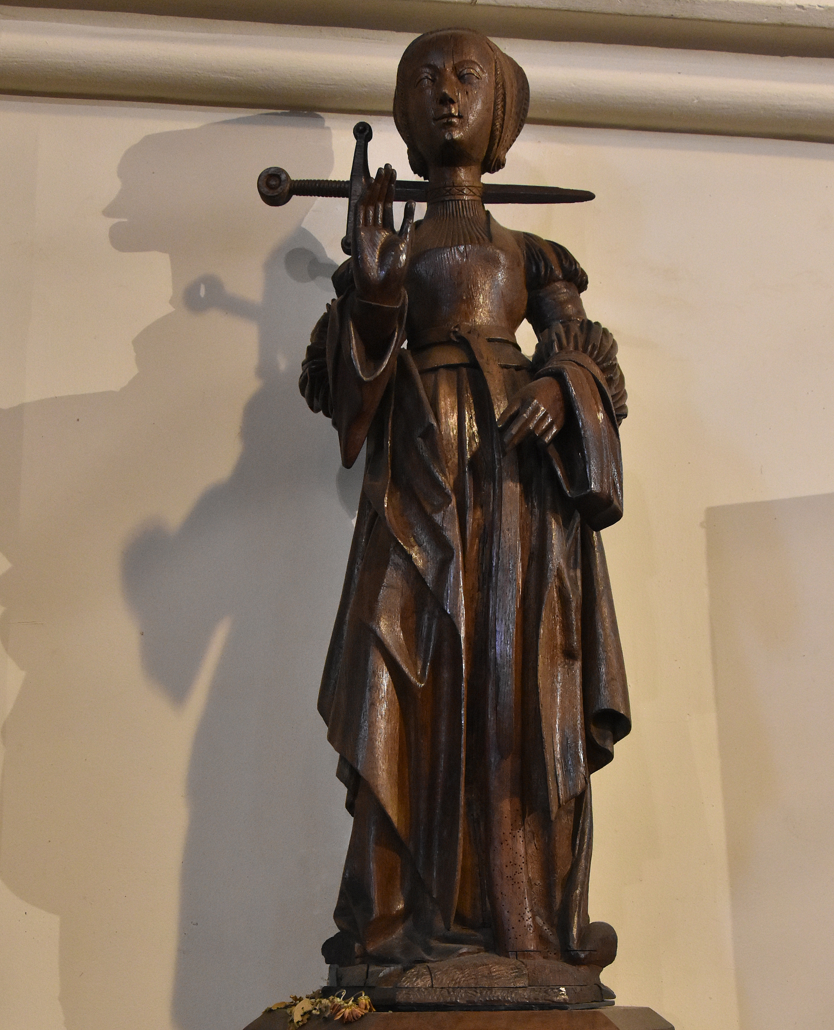 Meester van Elsloo (1520-30) Sint-Lucia Sint-Lambertuskerk (Neeroeteren) 8-09-2019 This photo of movable heritage has been taken in the Flemish Region